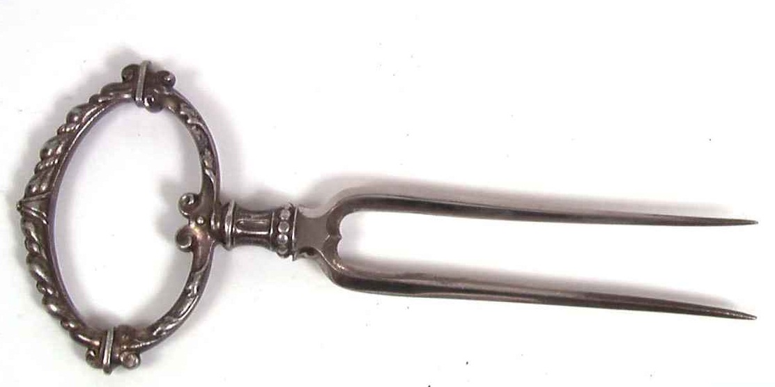 Forskjærgaffel i stål, lengde 22,7 cm. Foto Anne-Lise Reinsfelt, Norsk Folkemuseum, NF.1961-0141